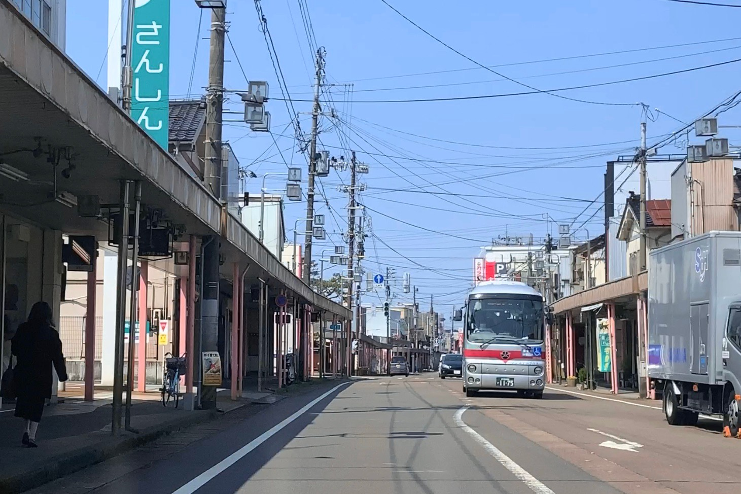 三条市本町2丁目付近（2020年4月）新潟県道35号三条停車場線